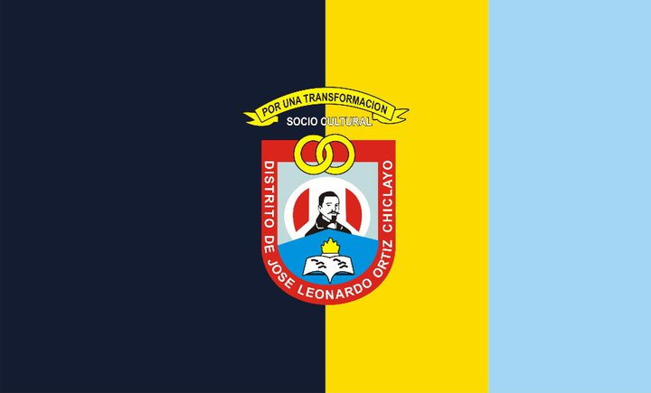 Bandera del Distrito de José Leonardo Ortiz